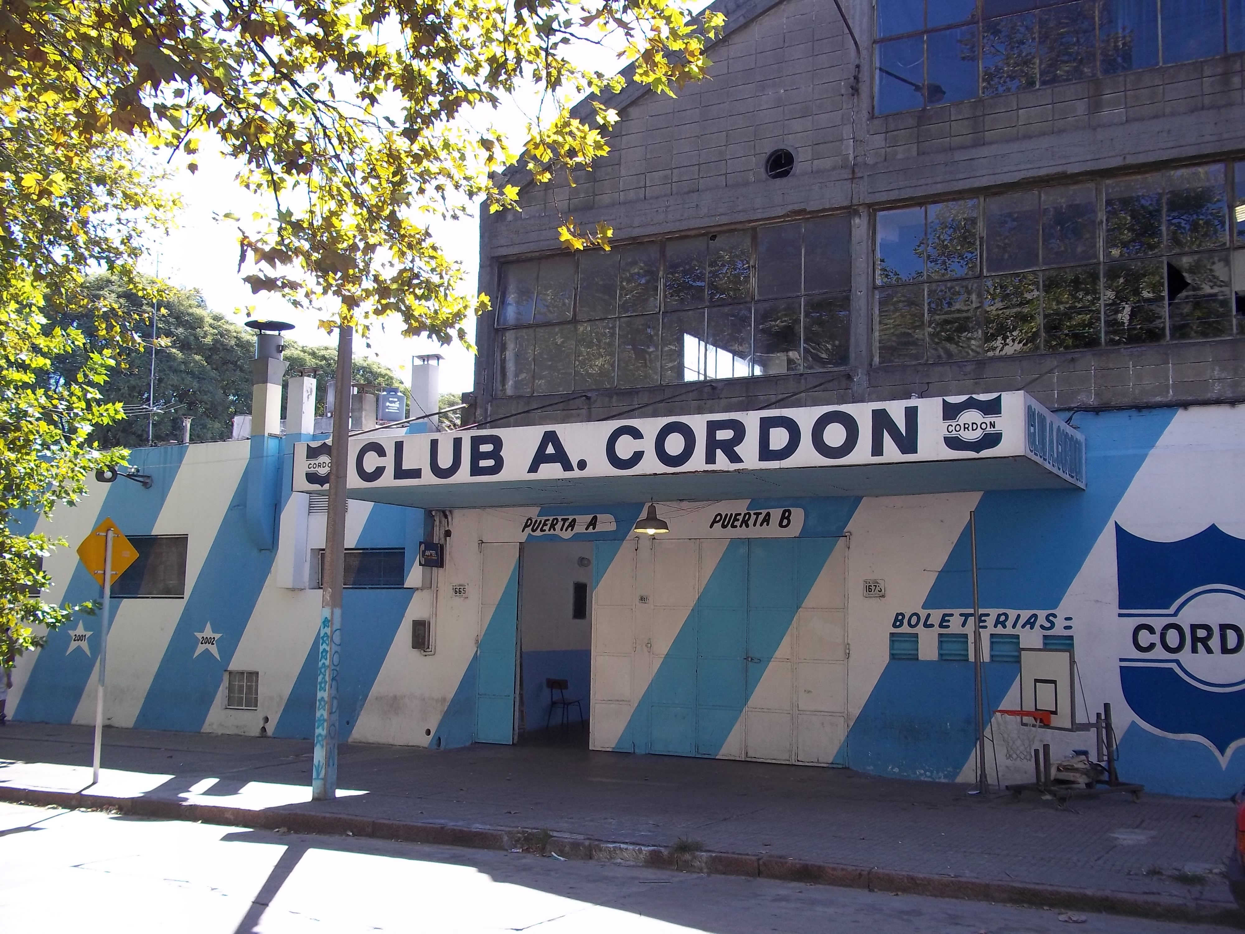 Entrada a la cancha Julio Zito del Club Atlético Cordón.